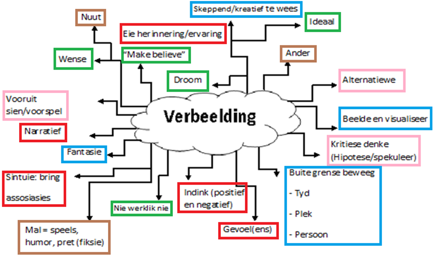 Vloeikaart van verbeelding